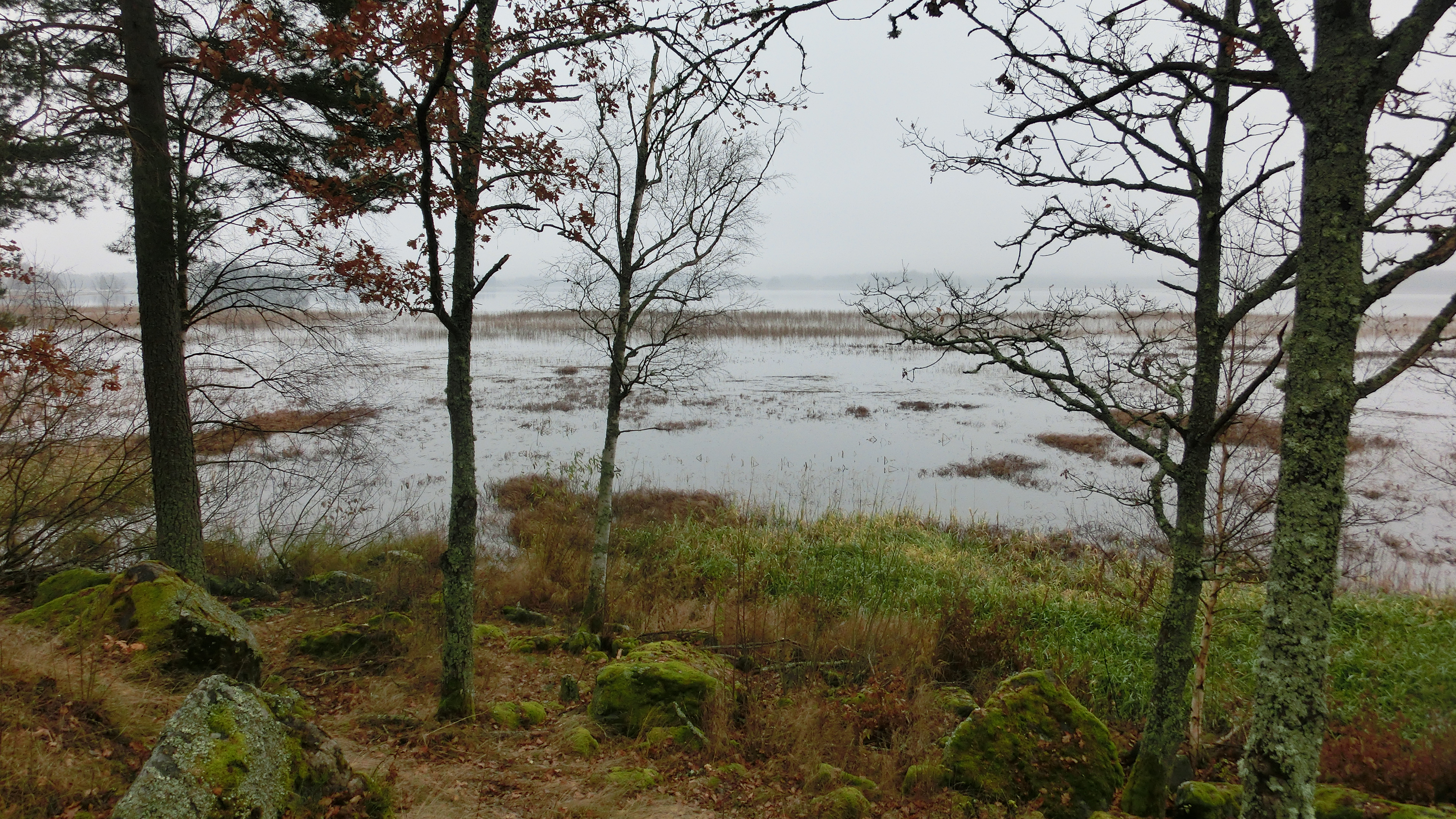 Fläcksjön sedd från Fläckebo hembygdsgård, Fläckebo socken, Sala kommun, Västmanlands län, Västmanland, Sverige. Fläcksjön avvattnas av Svartån, som rinner ut i Mälaren i Västerås.